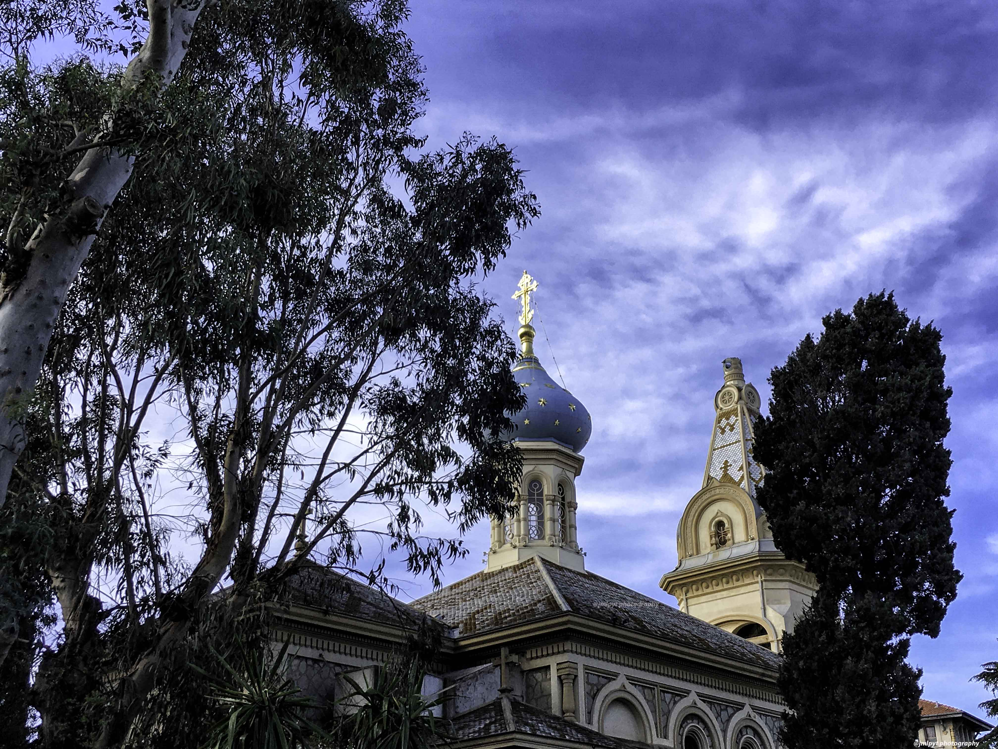 L’église Saint-Michel-Archange est une église orthodoxe russe située à Cannes, boulevard Alexandre-III, dans le département des Alpes-Maritimes